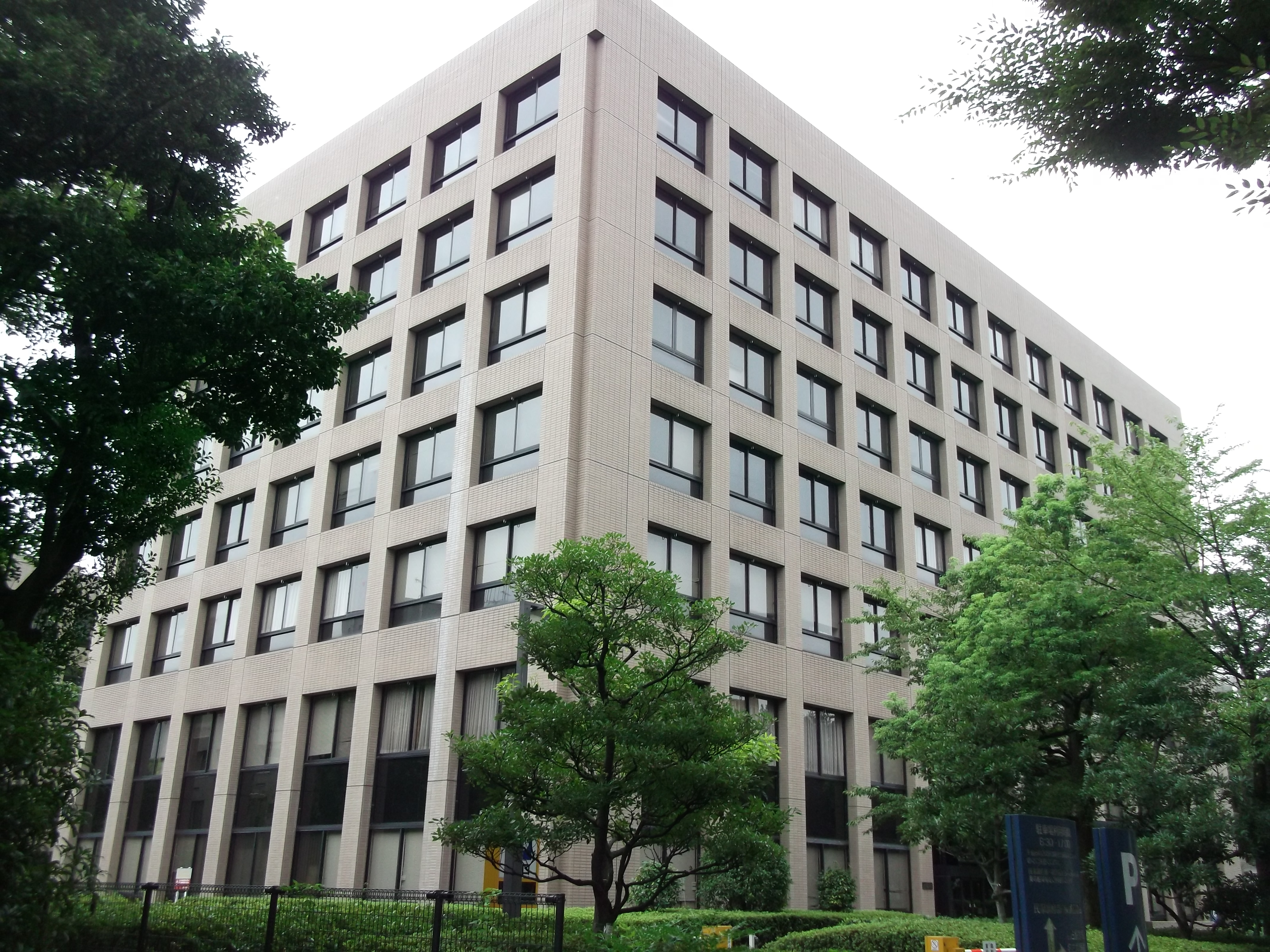 名古屋市中区の名古屋家庭裁判所を北側公道東側より撮影